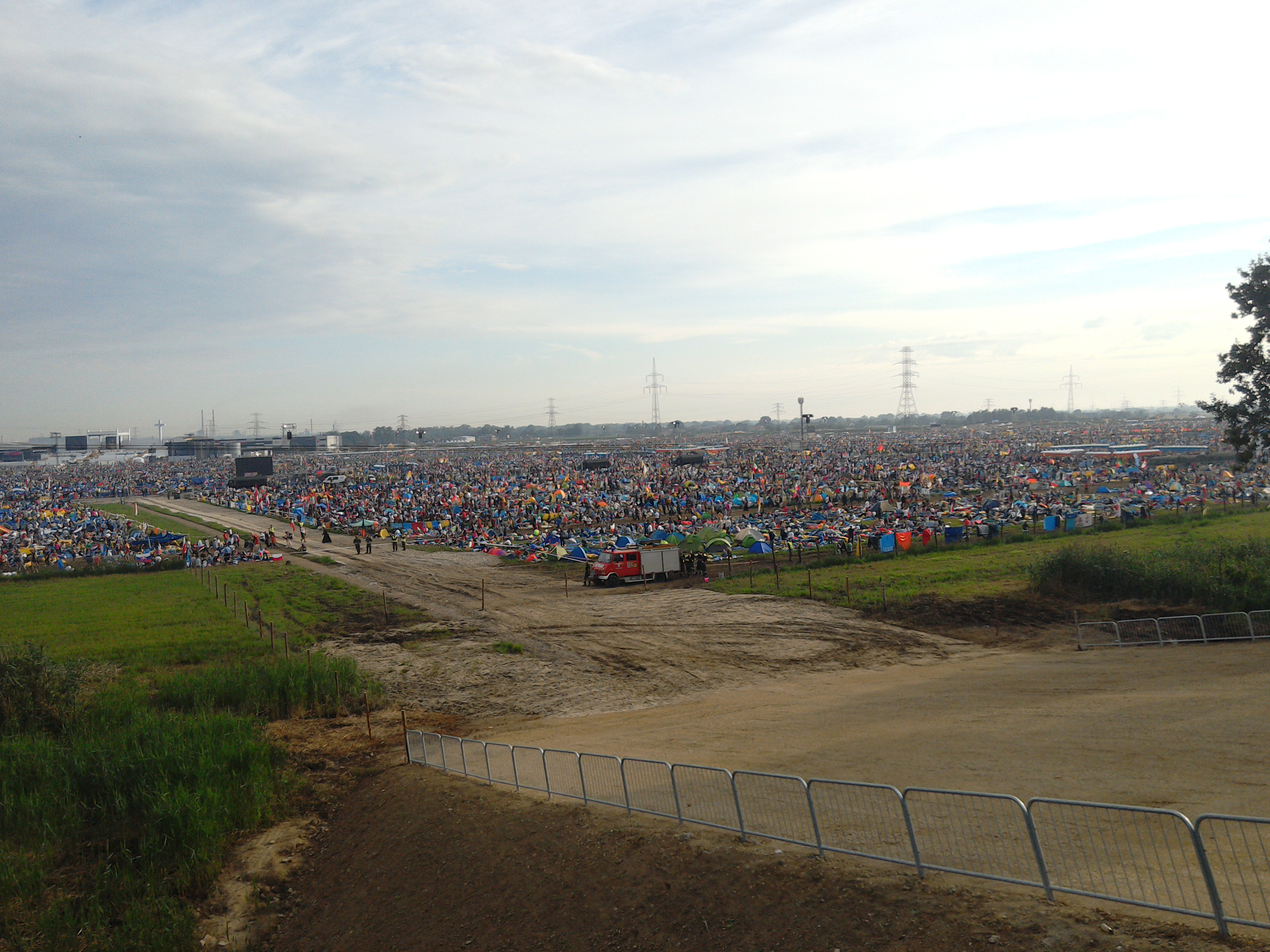 Zakończenie ŚDM, podkrakowska miejscowość Brzeg, 31 lipca 2016